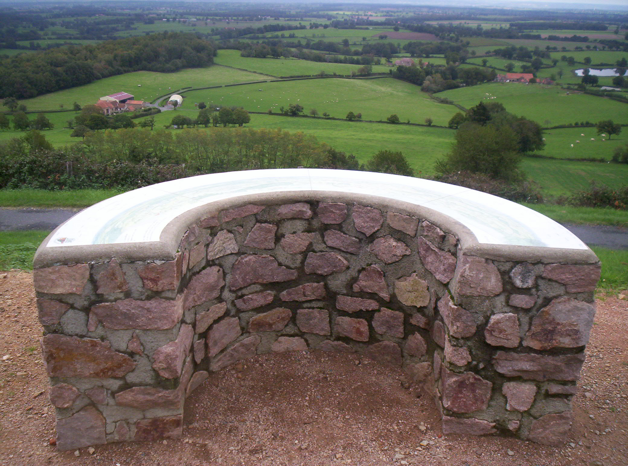 point de vue du site paysagé de SAINT-LEON